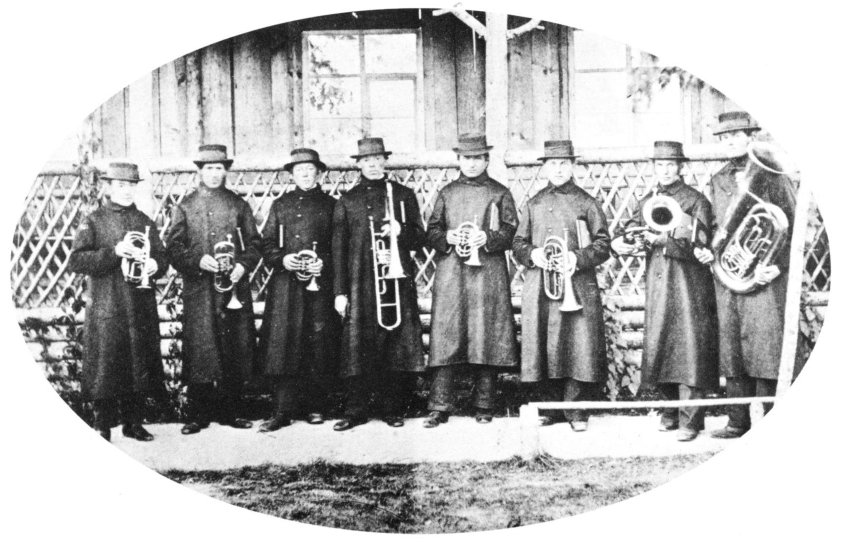 Gründungsmitglieder des Neuendettelsauer Posaunenchors